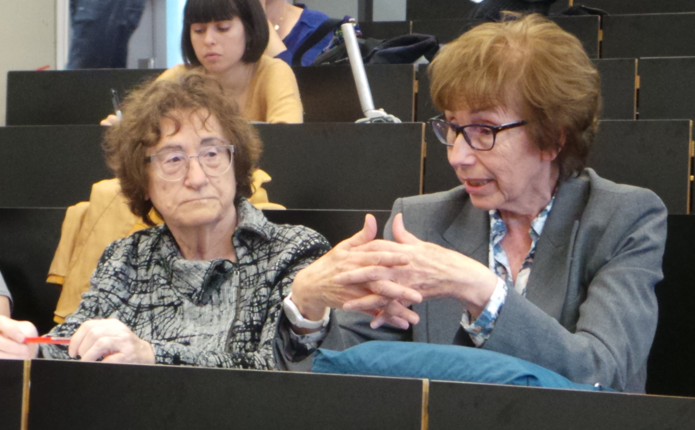 Inauguració espai Viquidones-Wikimujeres a la UPF. Maig de 2016